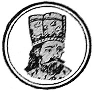 Vlad IV Călugărul en una representación del siglo XIX.